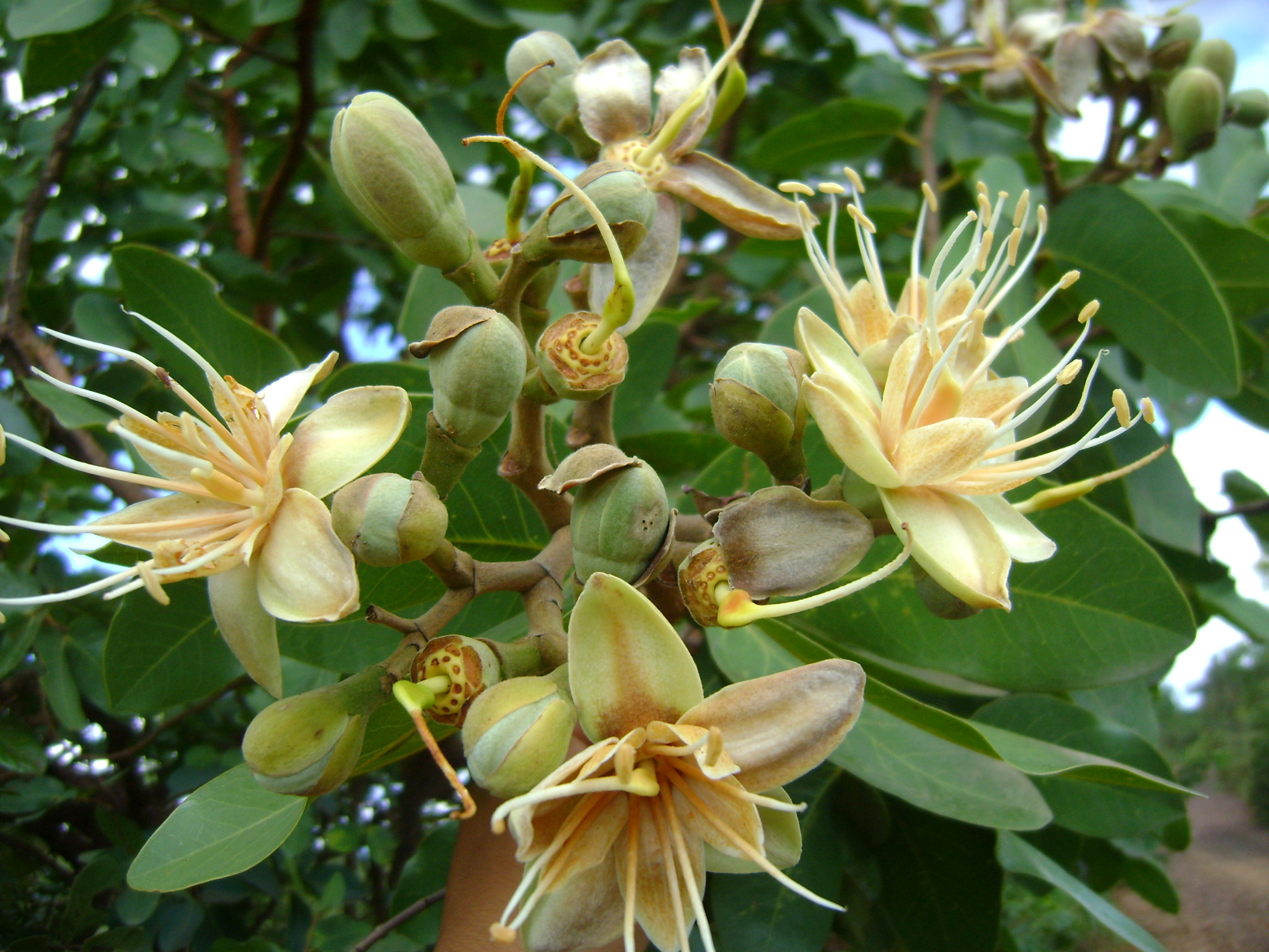 Cacho floral de Jatobá-do-Cerrado, Hymenaea stigonocarpa Mart. ex Hayne.